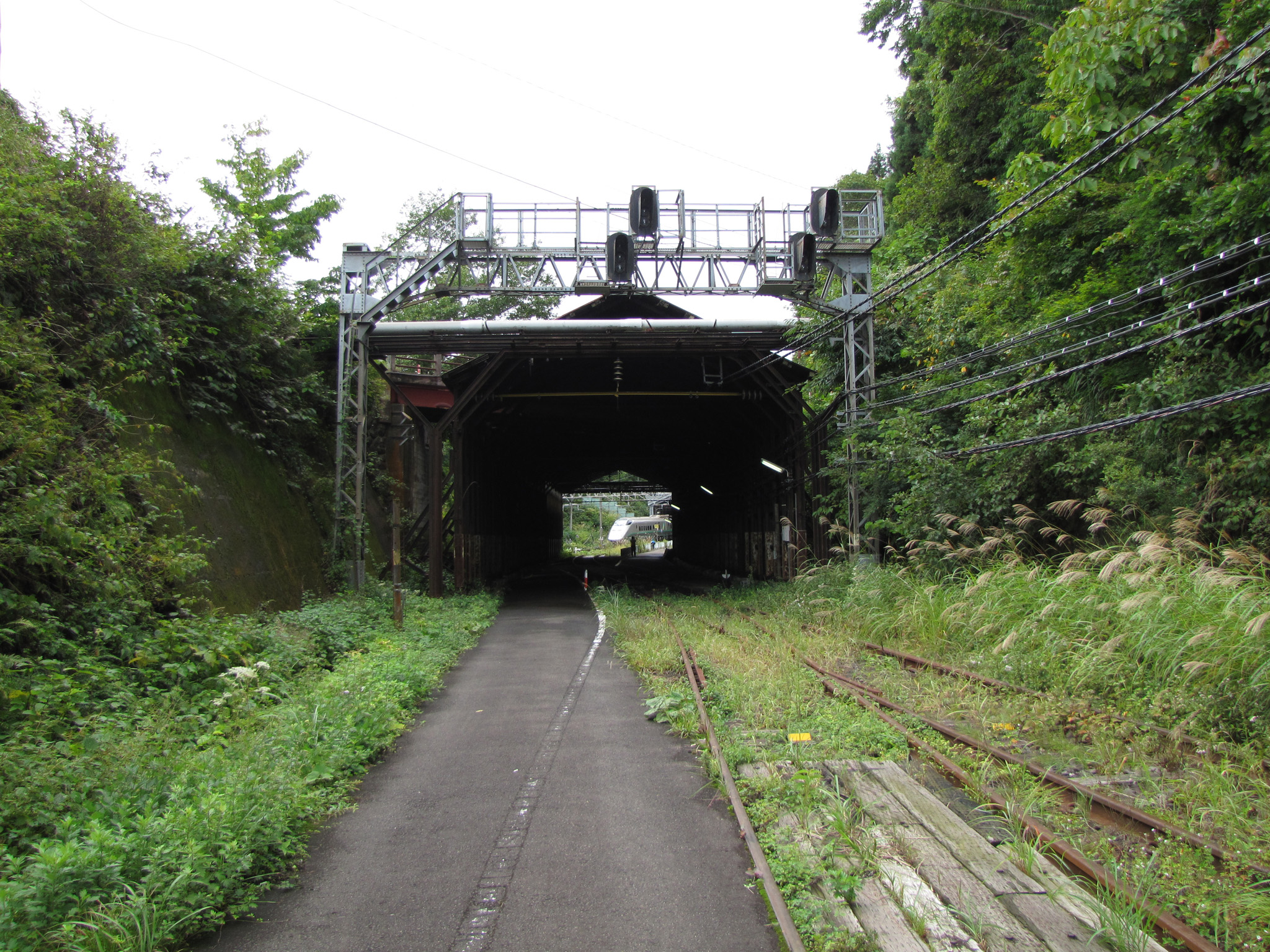 JR板谷駅 入口